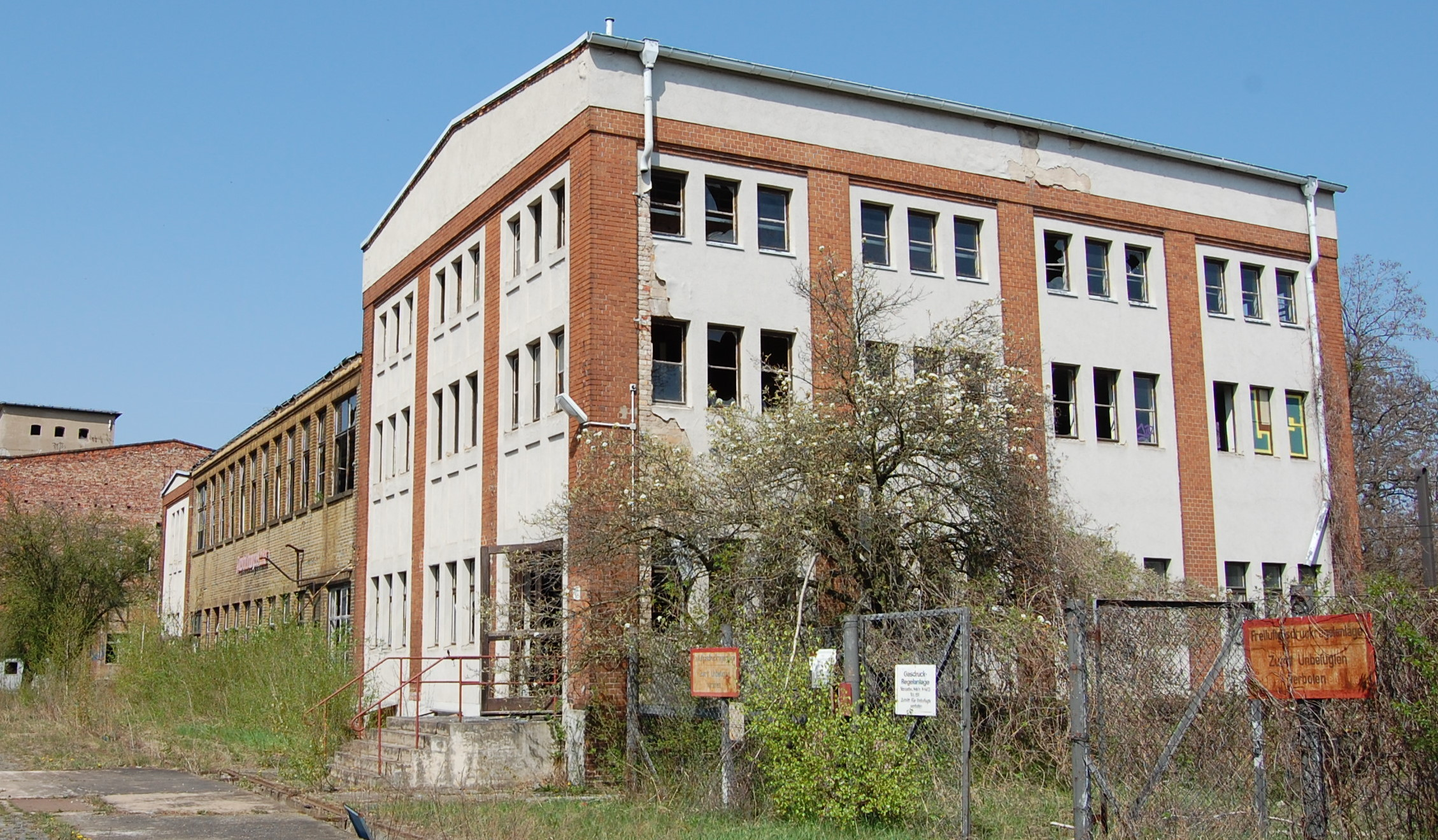 Ausbildungsstätte im RAW Salbke